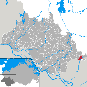 Dambeck in Mecklenburg-Vorpommern - district Ludwigslust